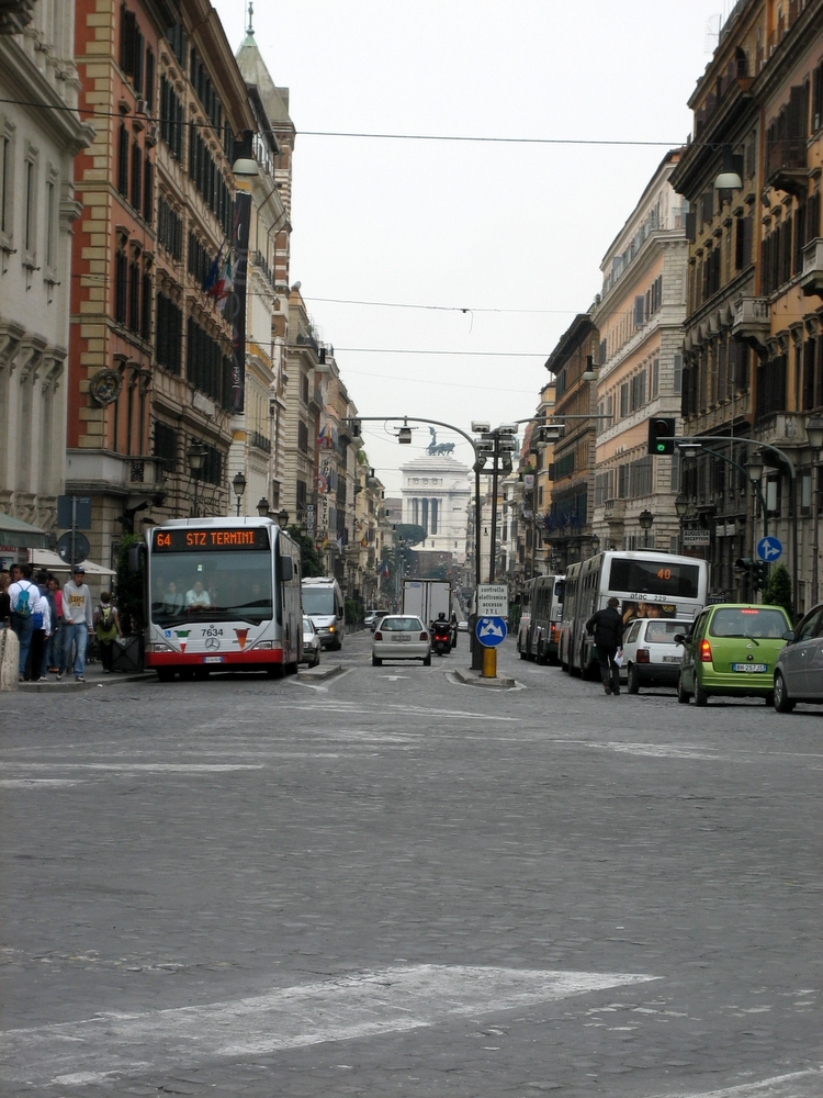 Via Nazionale, Roma , Italia